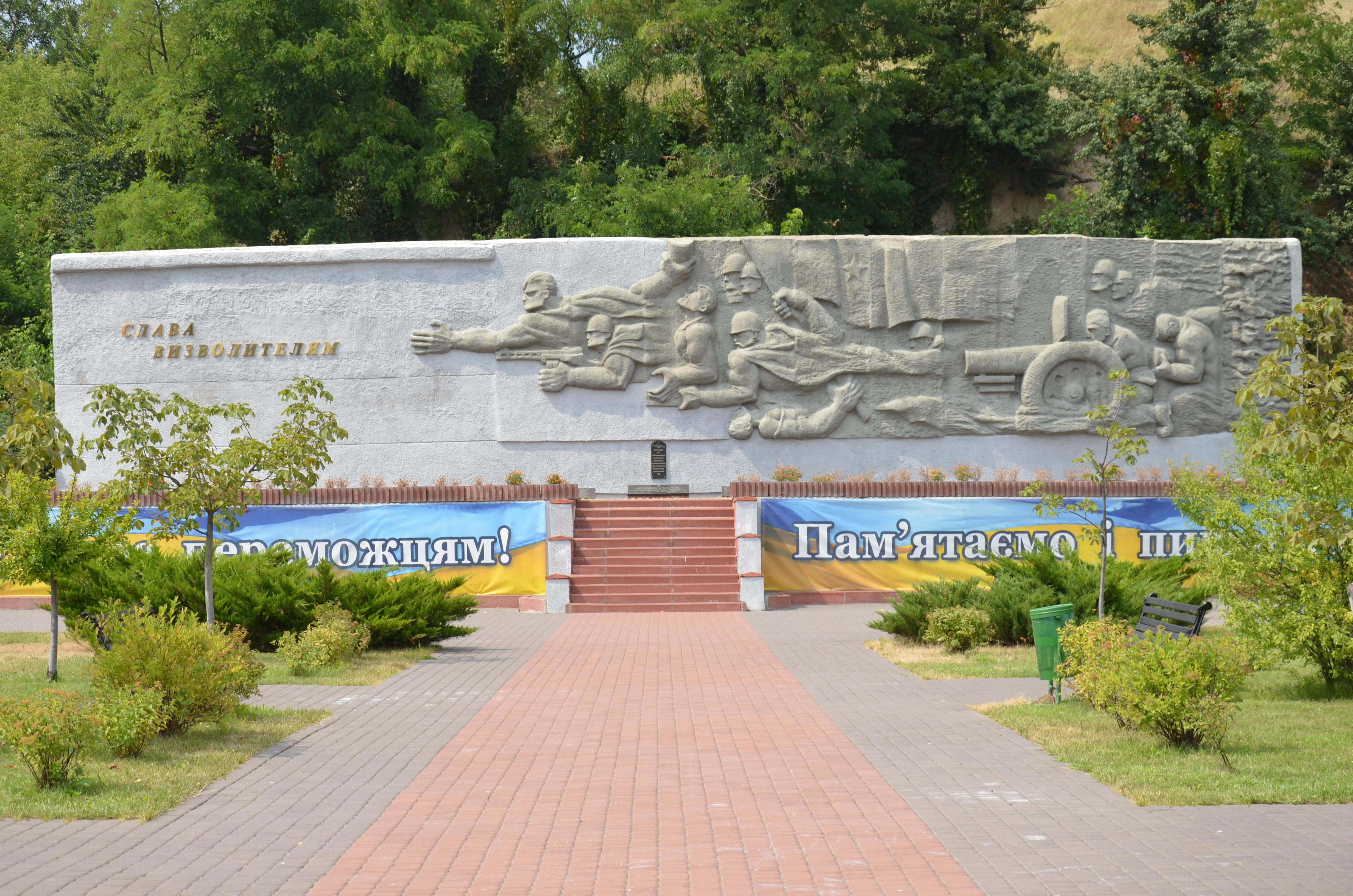 Пам’ятний знак на честь 167 Сумсько-Київської стрілецької дивізії, звільняла м.Вишгород у 1943р., Вишгород, вул. Набережна